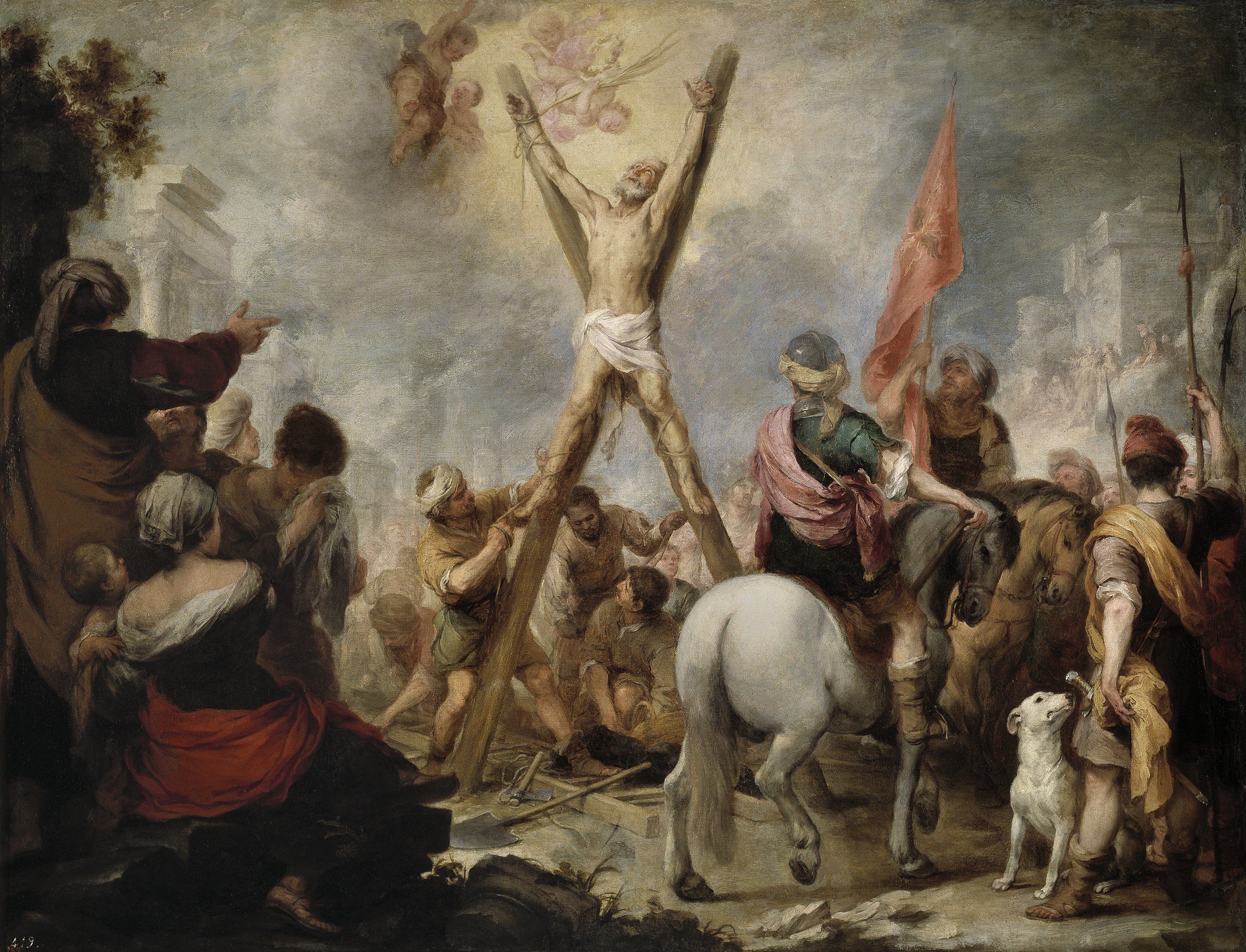 La obra representa el martirio del apóstol San Andrés, que según la tradición murió crucificado, al igual que su hermano San Pedro, el primer papa de la Iglesia Católica.